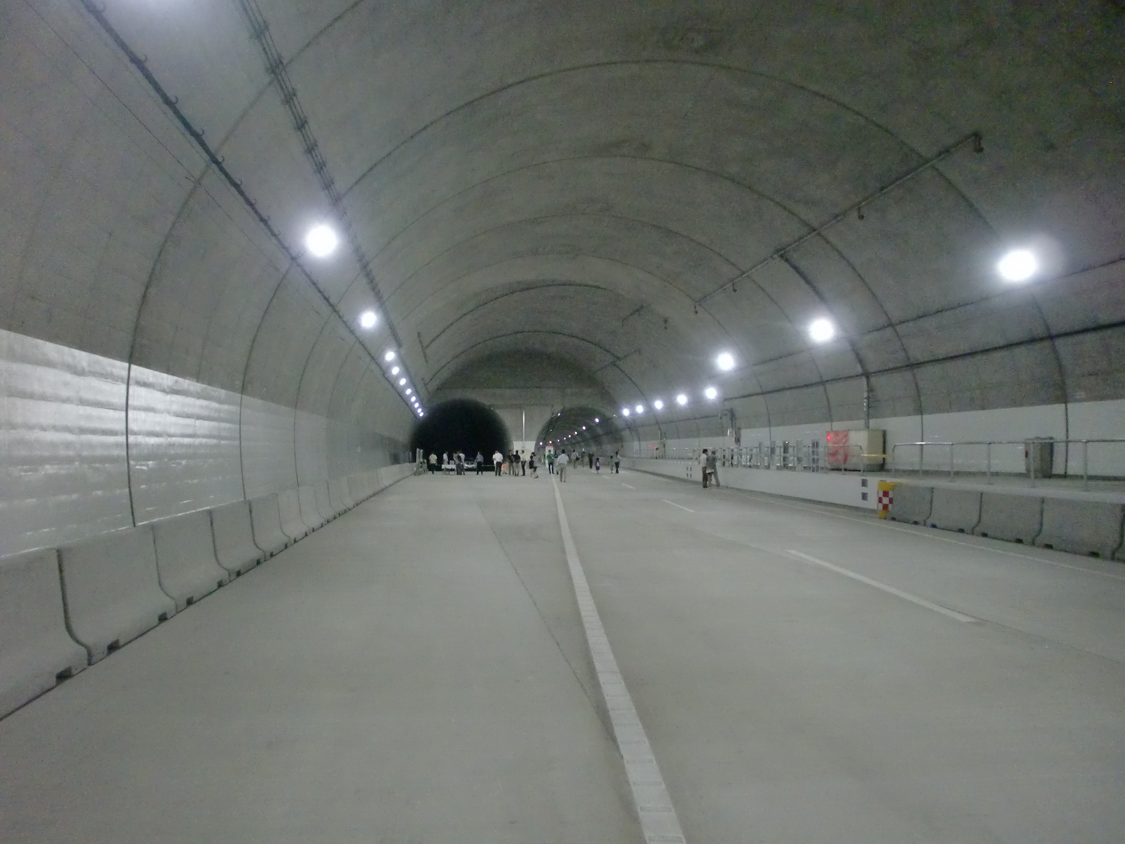 新武岡トンネルの本線とランプの合流部を鹿児島ICから鹿児島市街方面へ望む。この断面の掘削断面積は2013年時点で日本一である。